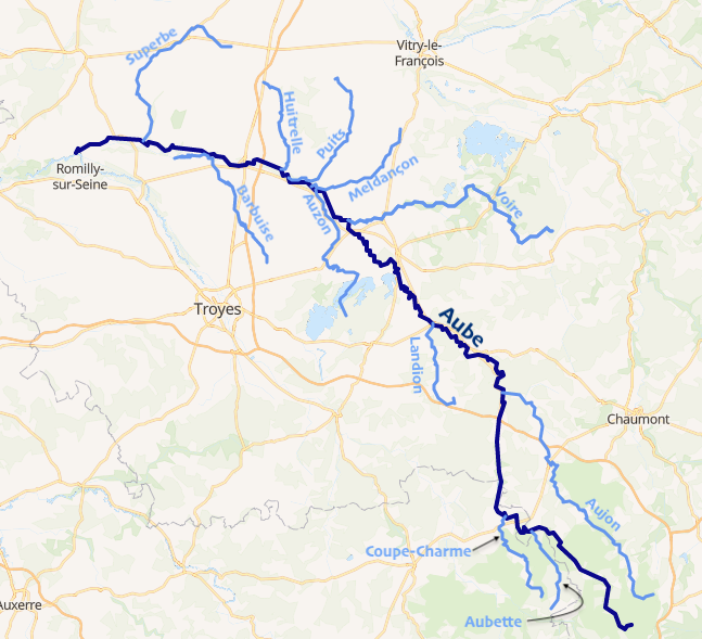 carte réalisée sur umap This map may be incomplete, and may contain errors. Don't rely solely on it for navigation.